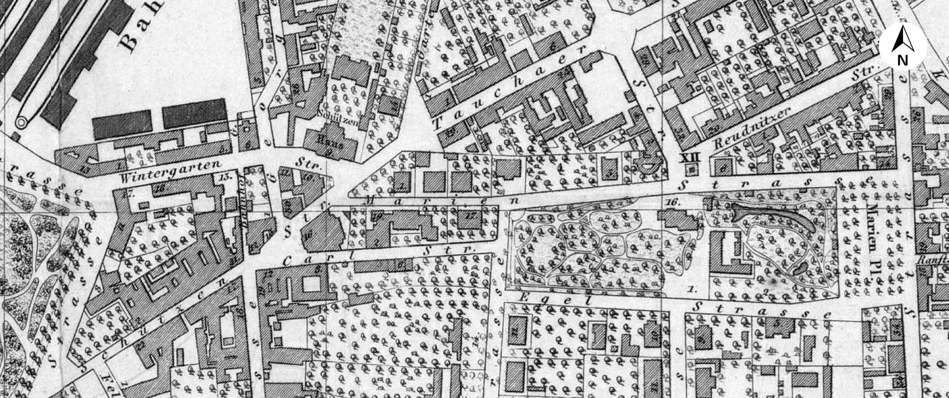 Milchinsel in Leipzig auf einem Plan aus dem Jahr 1864